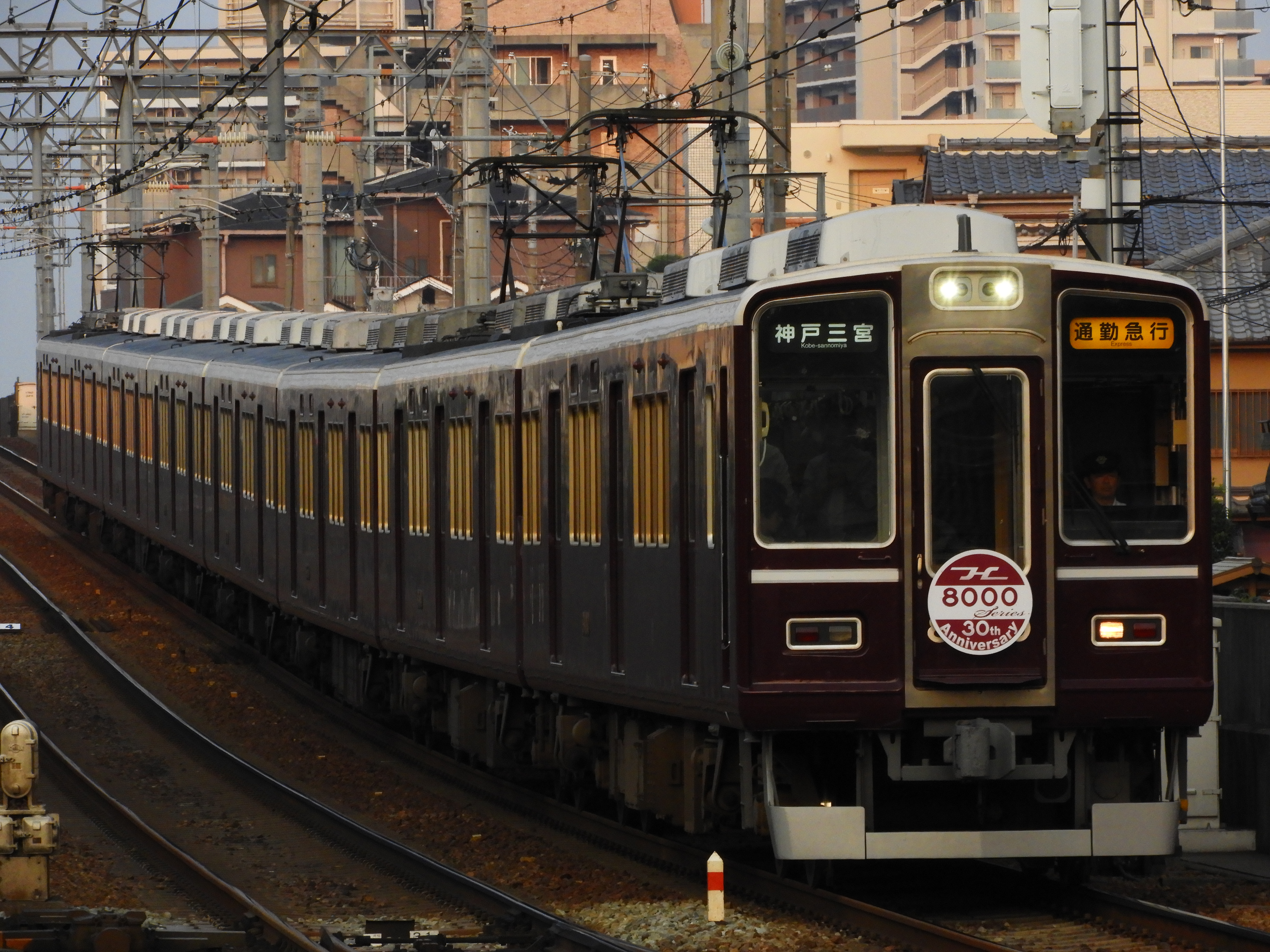 8000系8000F(30周年記念復刻＆HM)の通勤急行